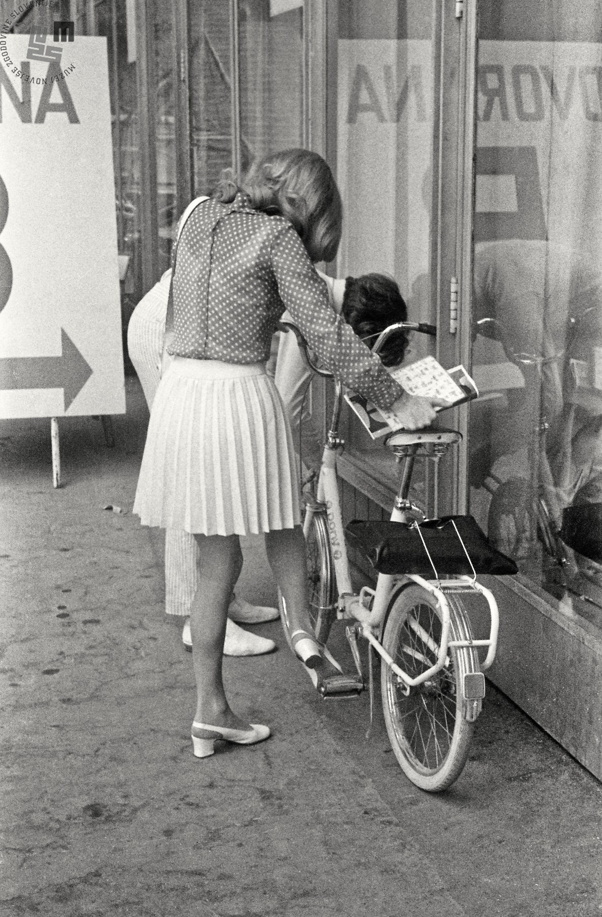 Pevka skupine Bele vrane Doca Marolt ob Pony kolesu, Ljubljana.